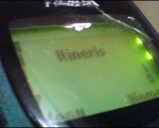 Itineris sur un Nokia